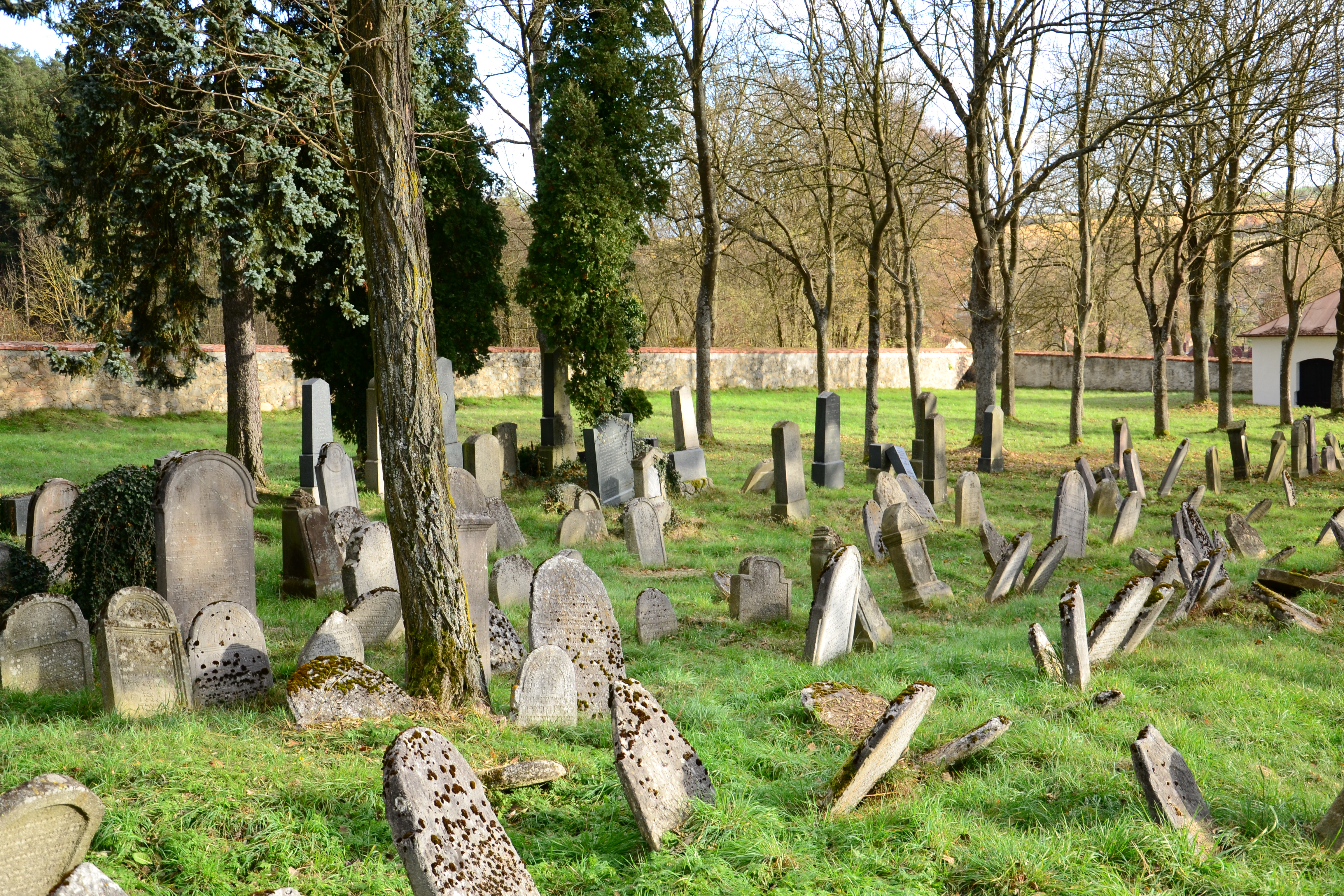 židovské památky